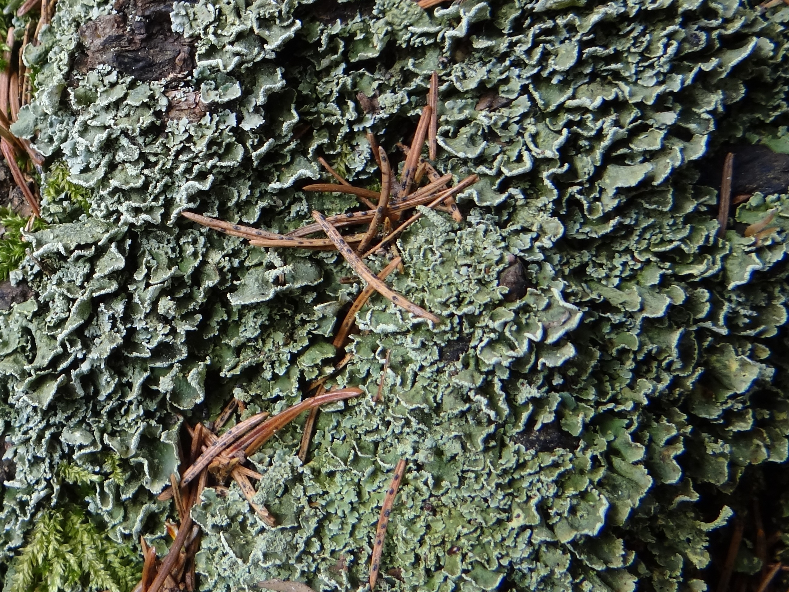 Cladonia digitata (location: Poland, Gorce, Bukowina Obidowska)